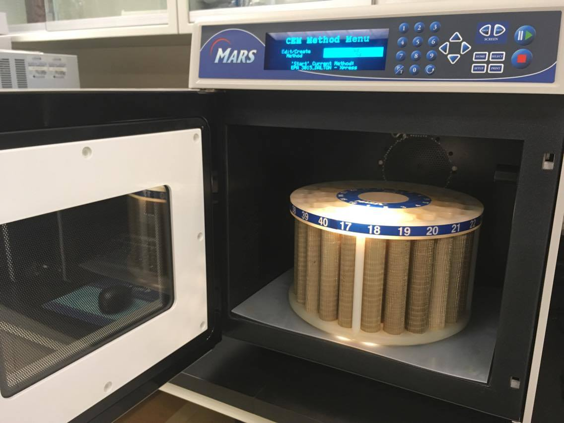 Image d'un micro-onde à digestion acide ouvert. Vue sur le carousselle.